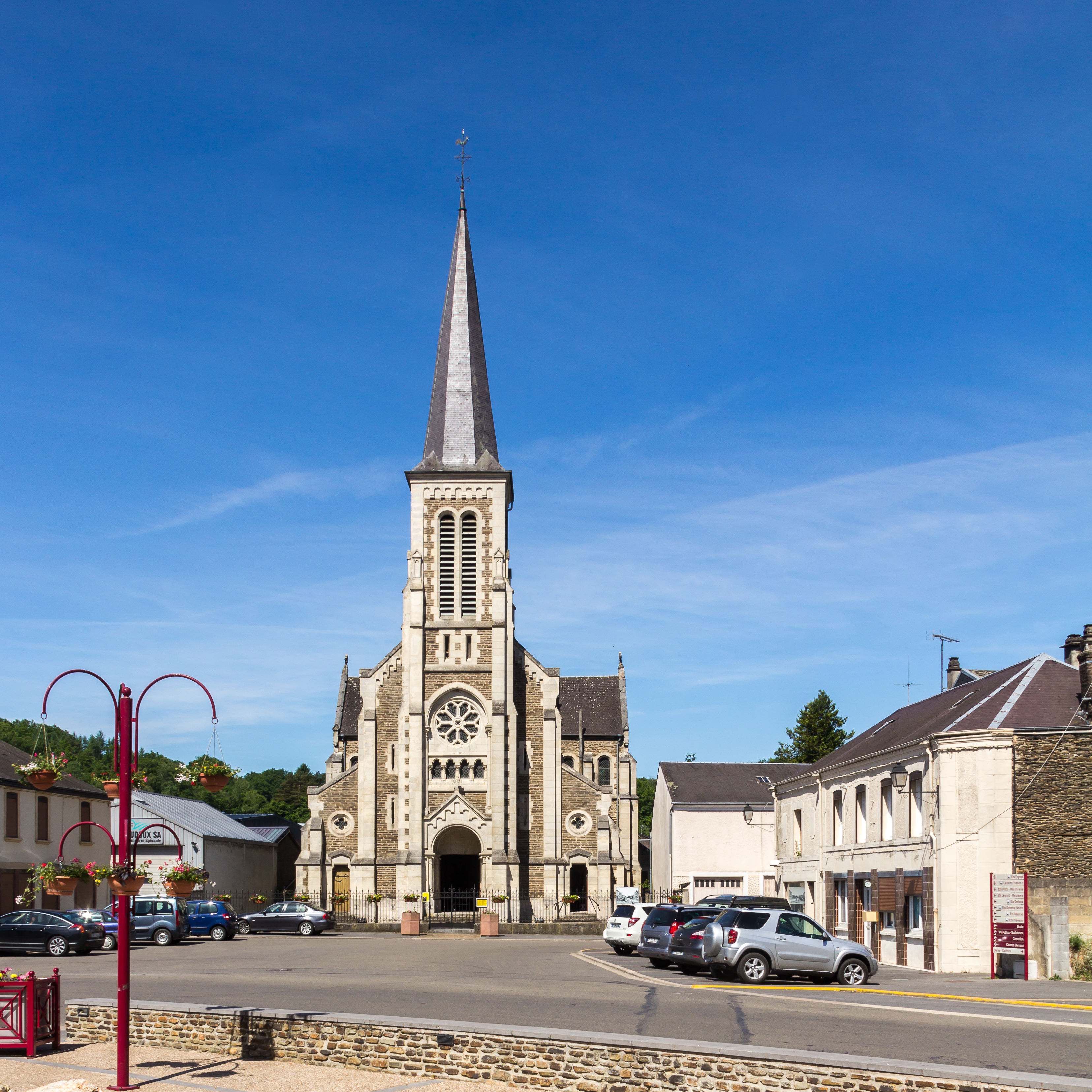 Église Saint-Remy, Thilay, Champagne-Ardenne